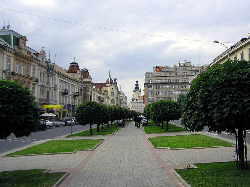 Parkway